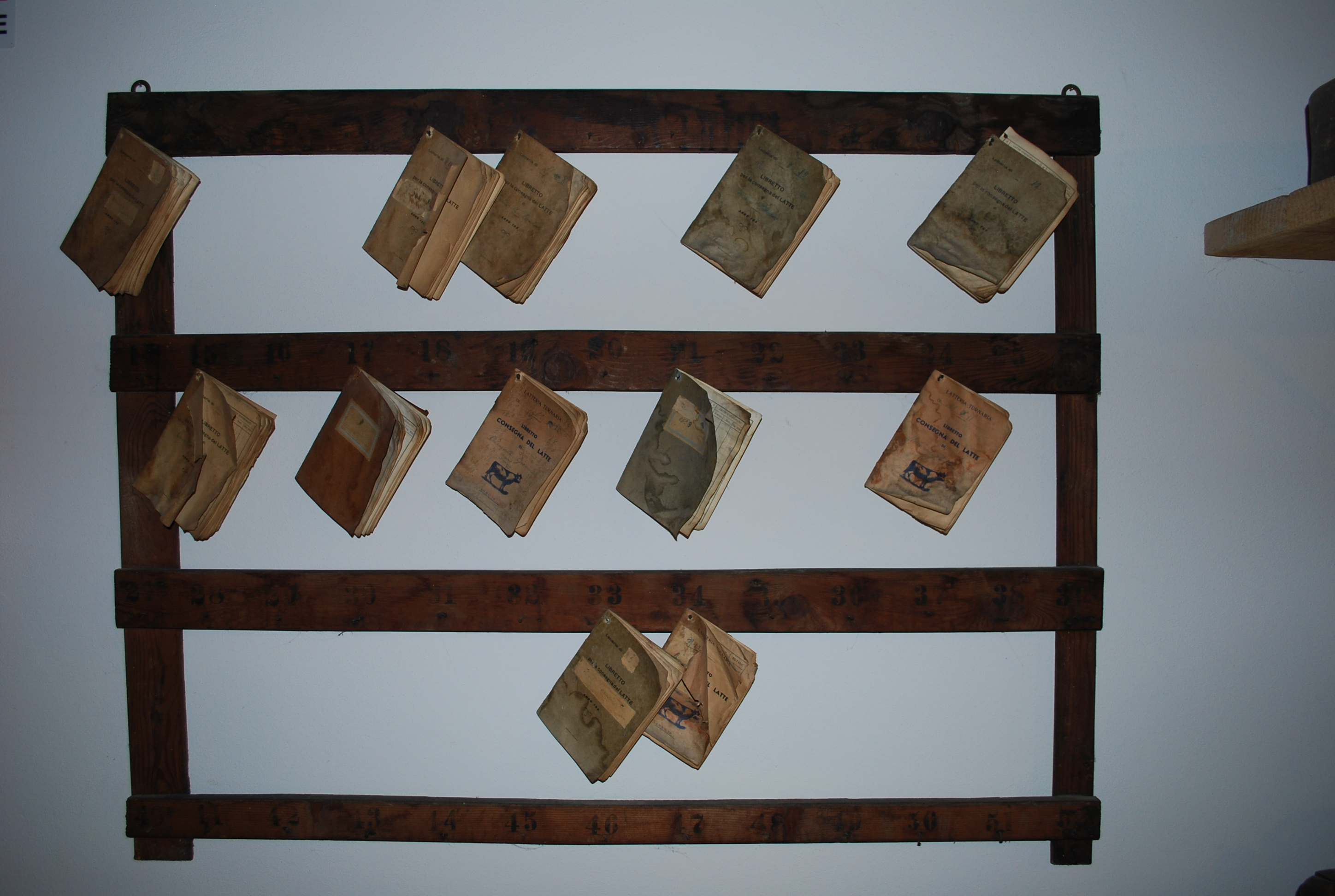 Registri del latte presso il Museo del Parco Nazionale della Val Grande